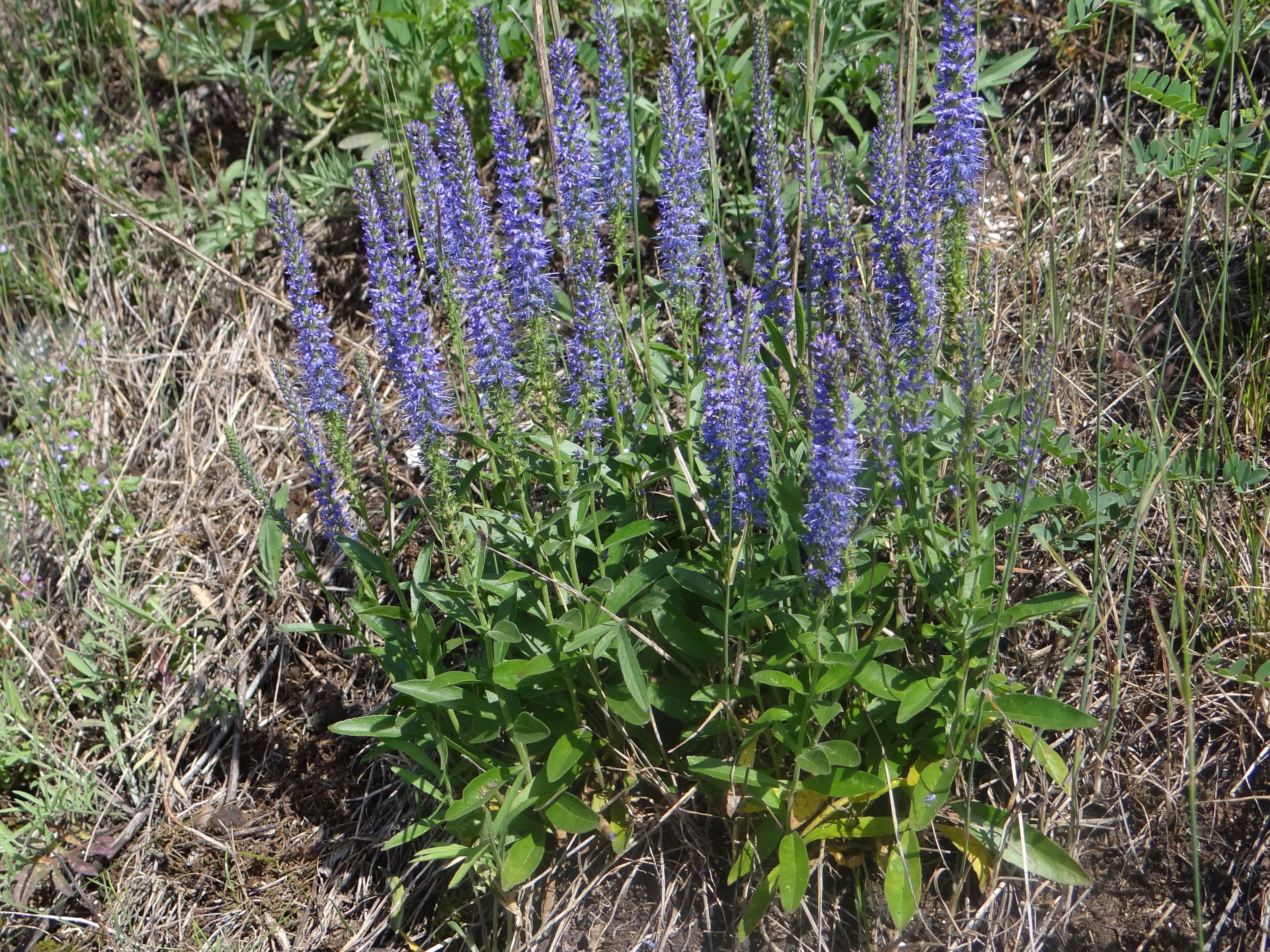 Veronica spicata. Location: Poland, Ryczów, województwo śląskie